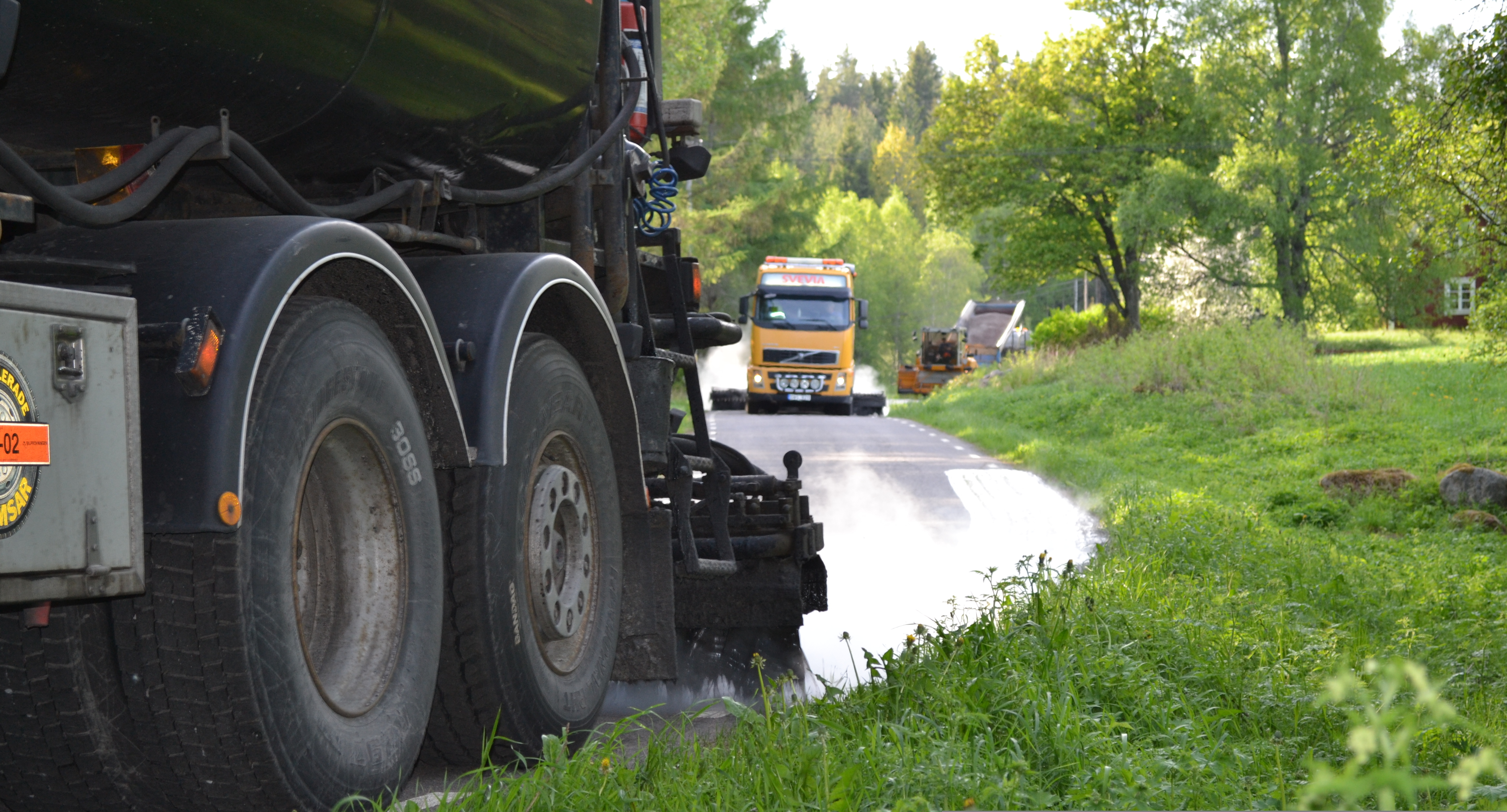 Bindemedel som sprids på en redan belagd väg. I bakgrunden syns ytterligare en spridarbil och därefter singelspridaren som applicerar stenen.